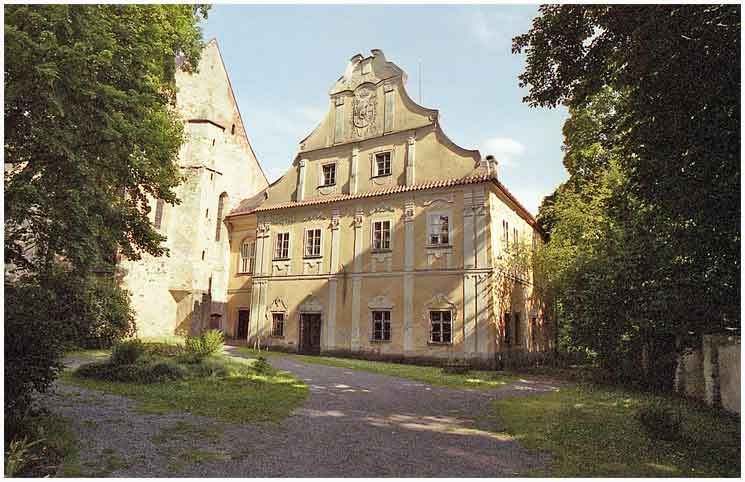 bývalý zámek v Pohledu